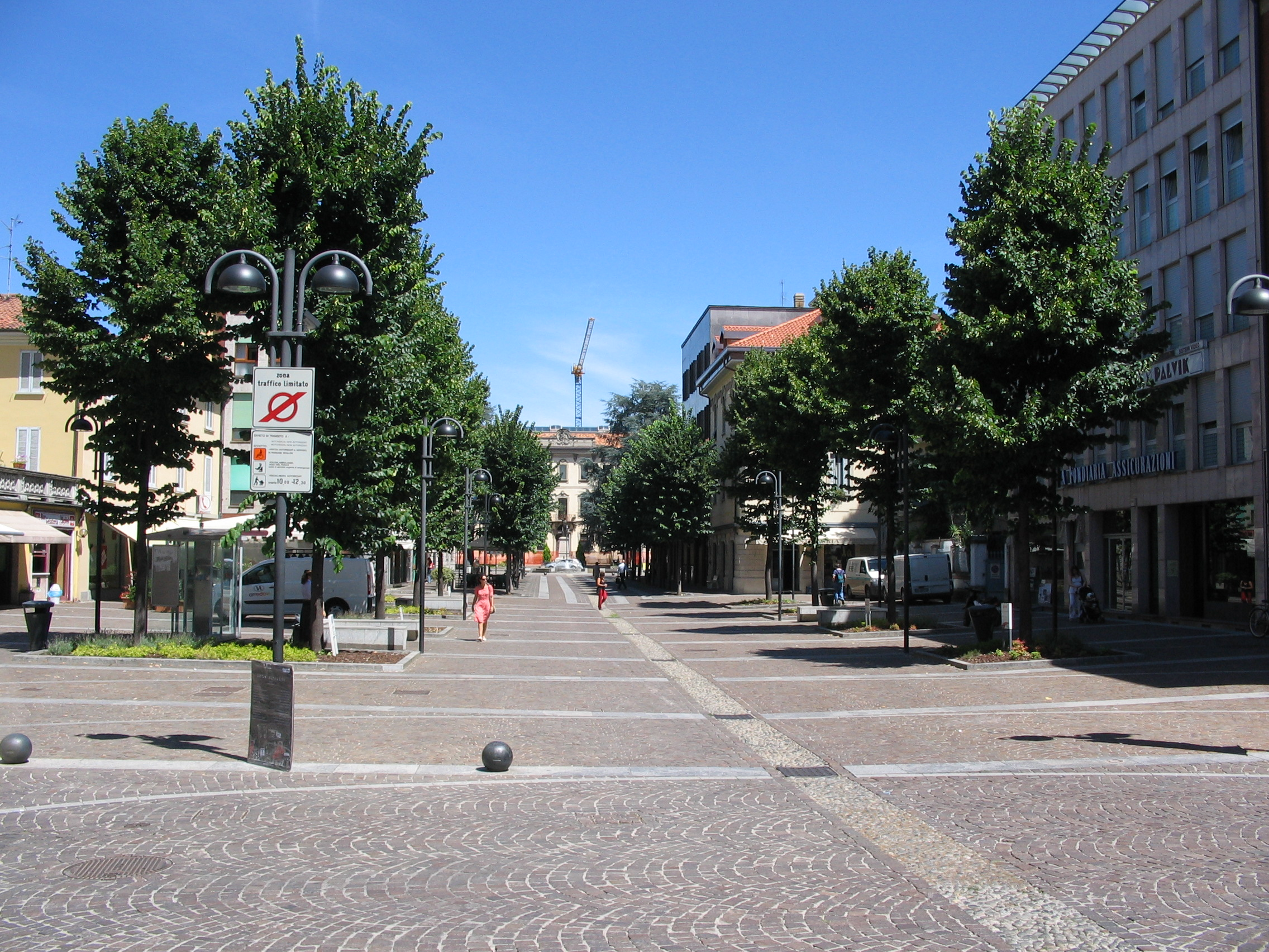 Merate, Piazza Prinetti.